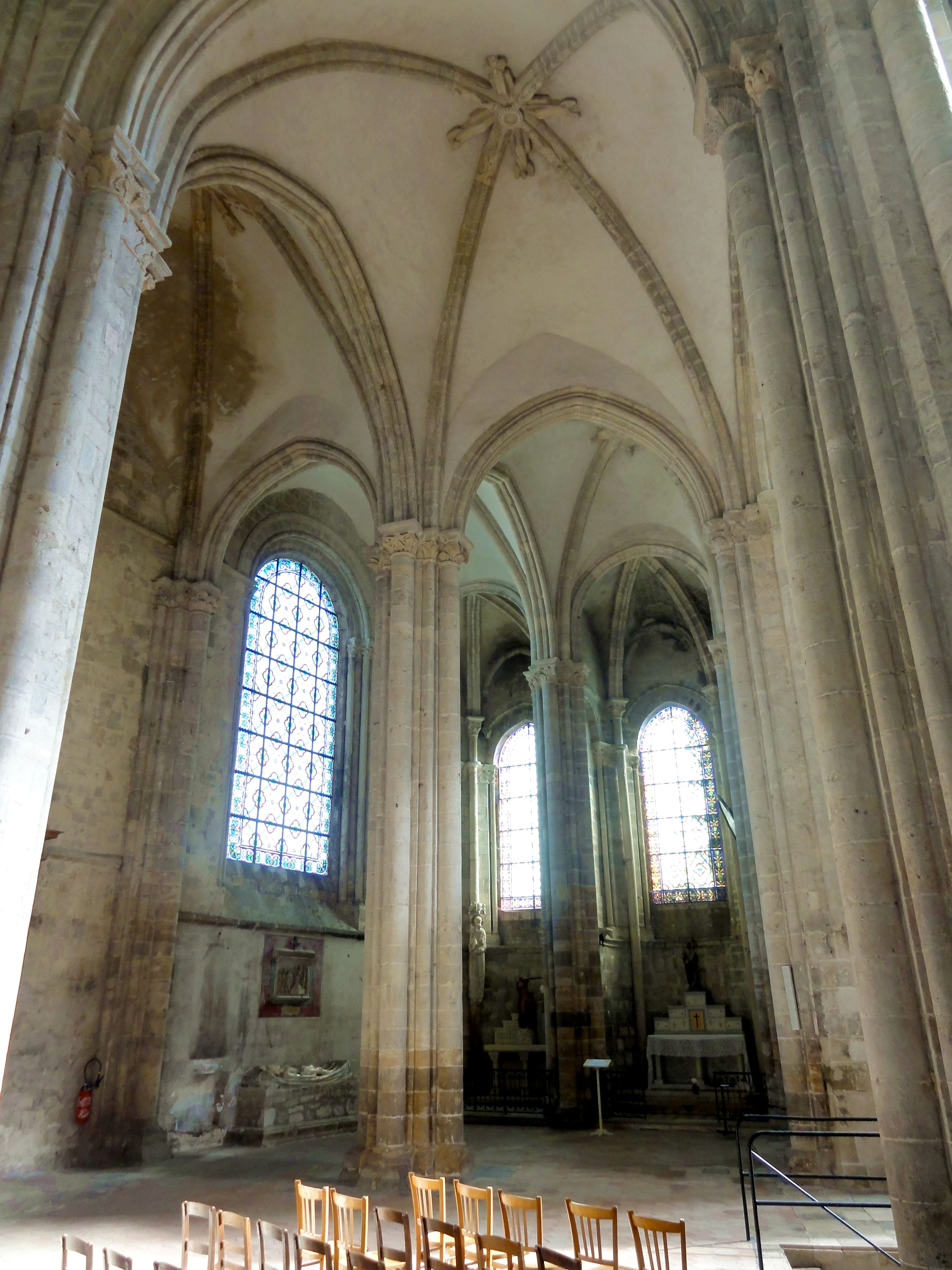 Collatéral nord, vue vers l'est.